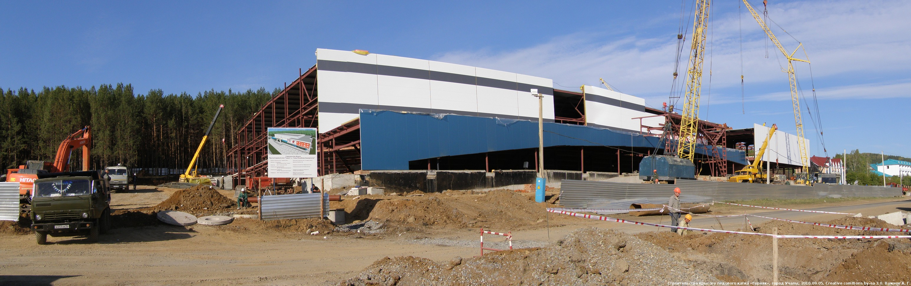 Строительство крытого ледового катка «Горняк», город Учалы